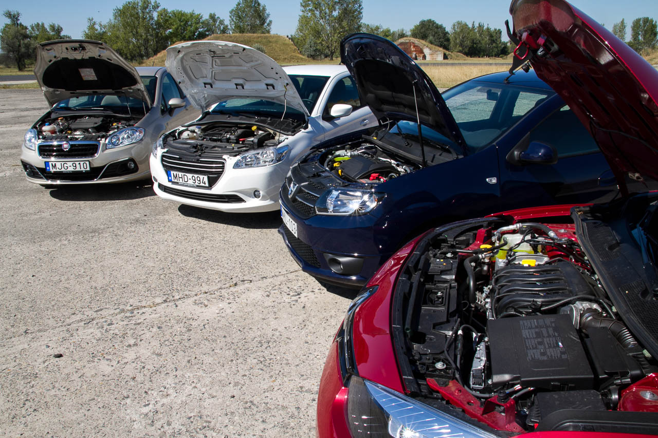 Fotó a Totalcar Magyarország legolcsóbb családi autói című összehasonlító tesztjéről.